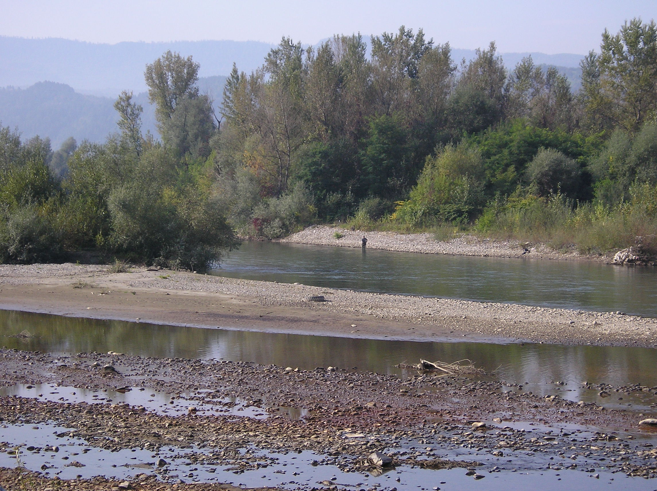 Україна-Закарпатська область-Солотвино-Річка Тиса.На тому березі територія Румінії.